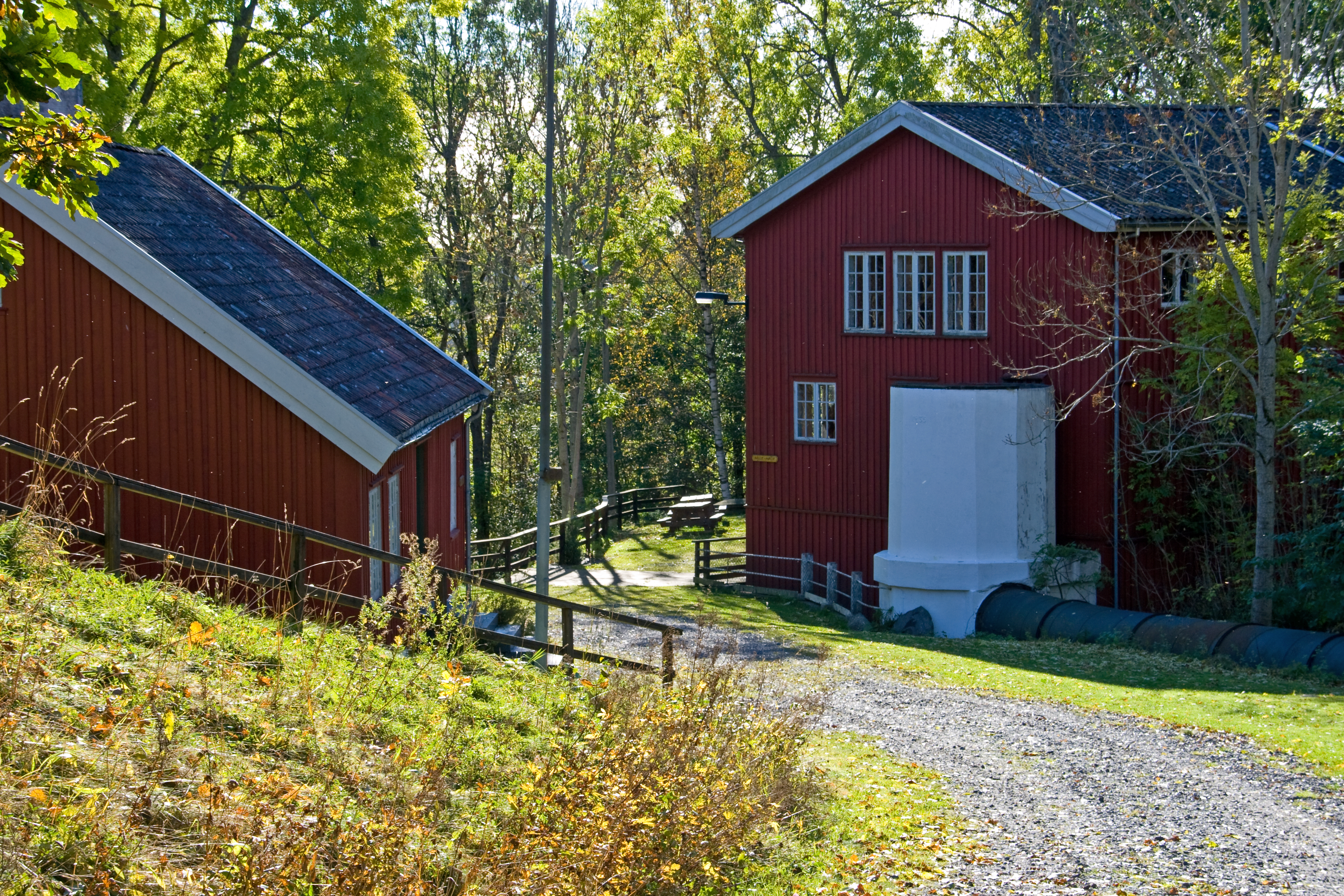 Halle Mølle